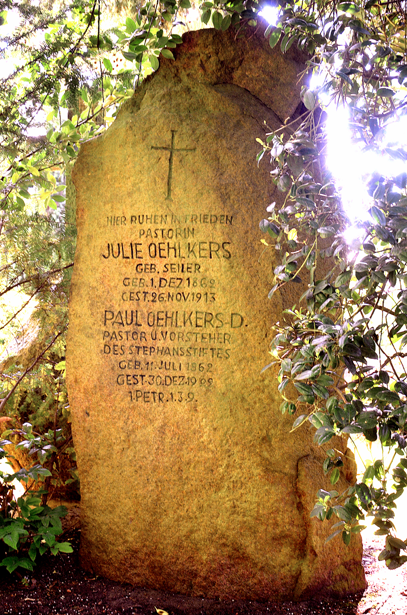 Auf dem Friedhof des Stephansstiftes, in Hannover, Stadtteil Kleefeld, findet sich dieser aufrecht stehende Findling als Grabstein für die Pastorin „Julie Oehlkers“ geborene Seiler (* 1. Dezember 1862; † 26. November 1913) und den „Paul Oehlkers-D“ Pastor und Vorsteher des Stephansstiftes (* 11. Juli 1862; † 30. Dezember 1822) ...